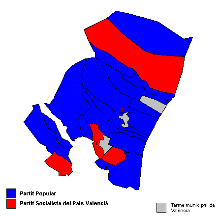 Partits polítics més votats als municipis de l'Horta Nord (País Valencià) després de les eleccions municipals de 2007.